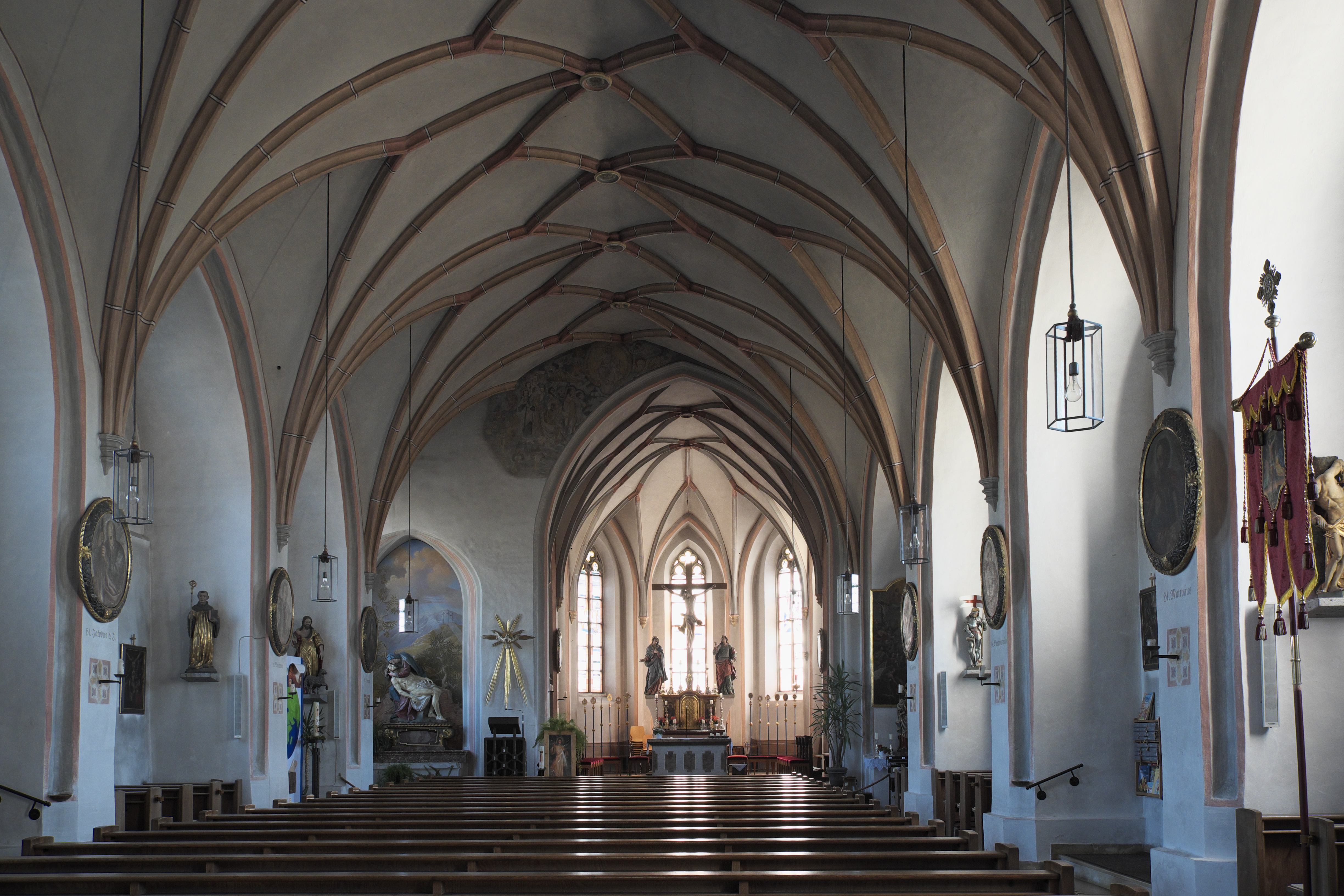 Katholische Pfarrkirche St. Rupertus in Eiselfing im Landkreis Rosenheim (Bayern/Deutschland), um 1500, Innenraum